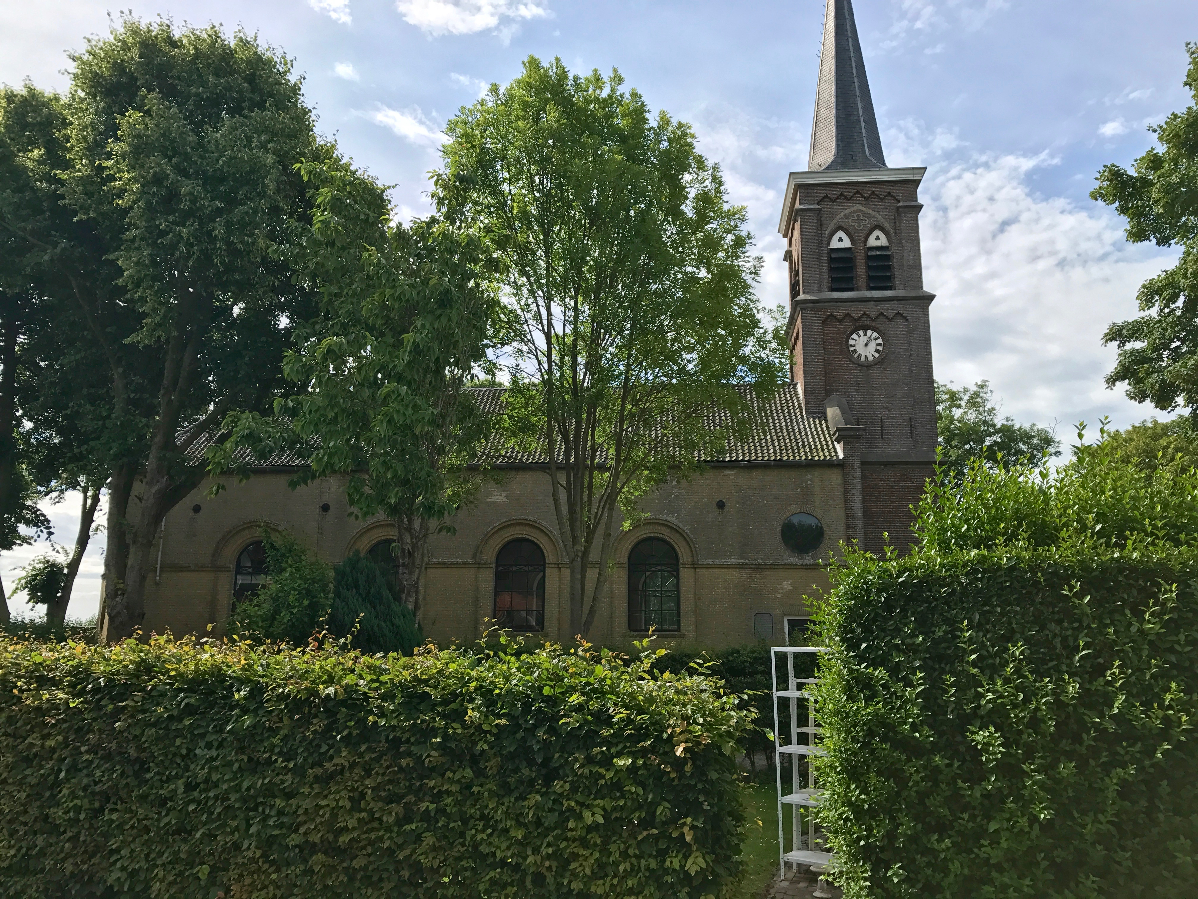 Tsjerkhofspaed 1